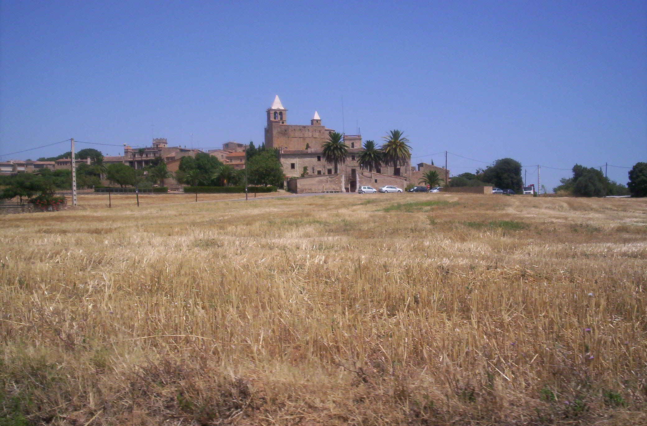 Vista del poble des de la carretera